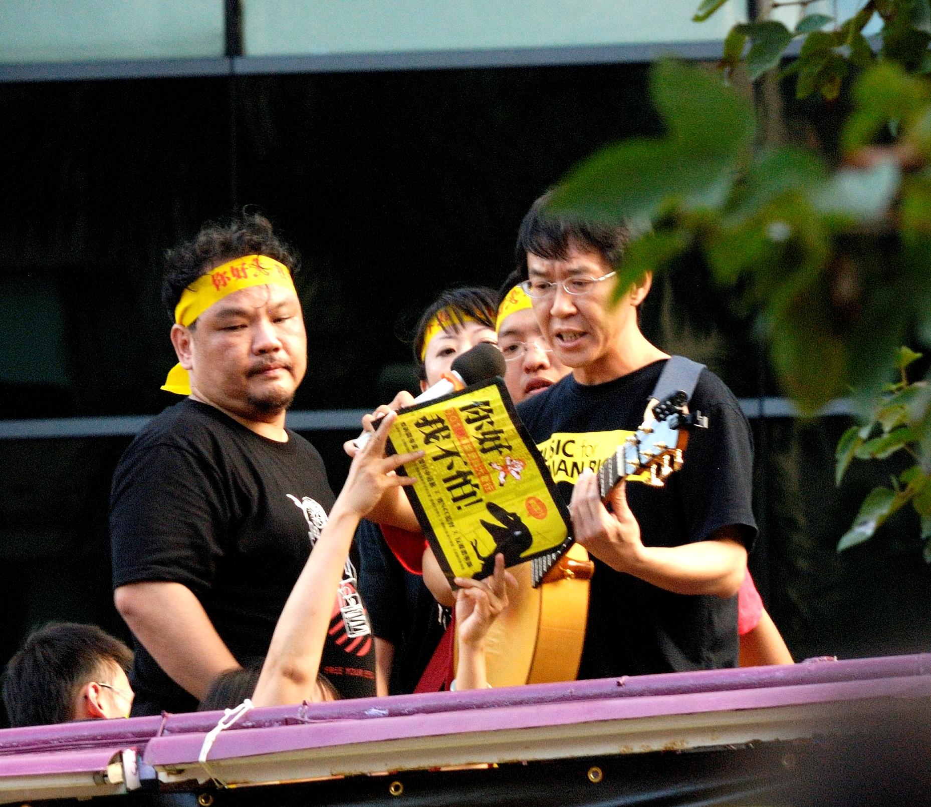 中文（台灣）: 林生祥唱反媒體壟斷戰歌